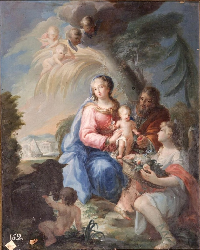 La obra representa a los tres miembros de la Sagrada Familia cristiana descansando durante su huida hacia Egipto, adonde se dirigían para evitar que el rey Herodes el Grande diera muerte al Niño Jesús.